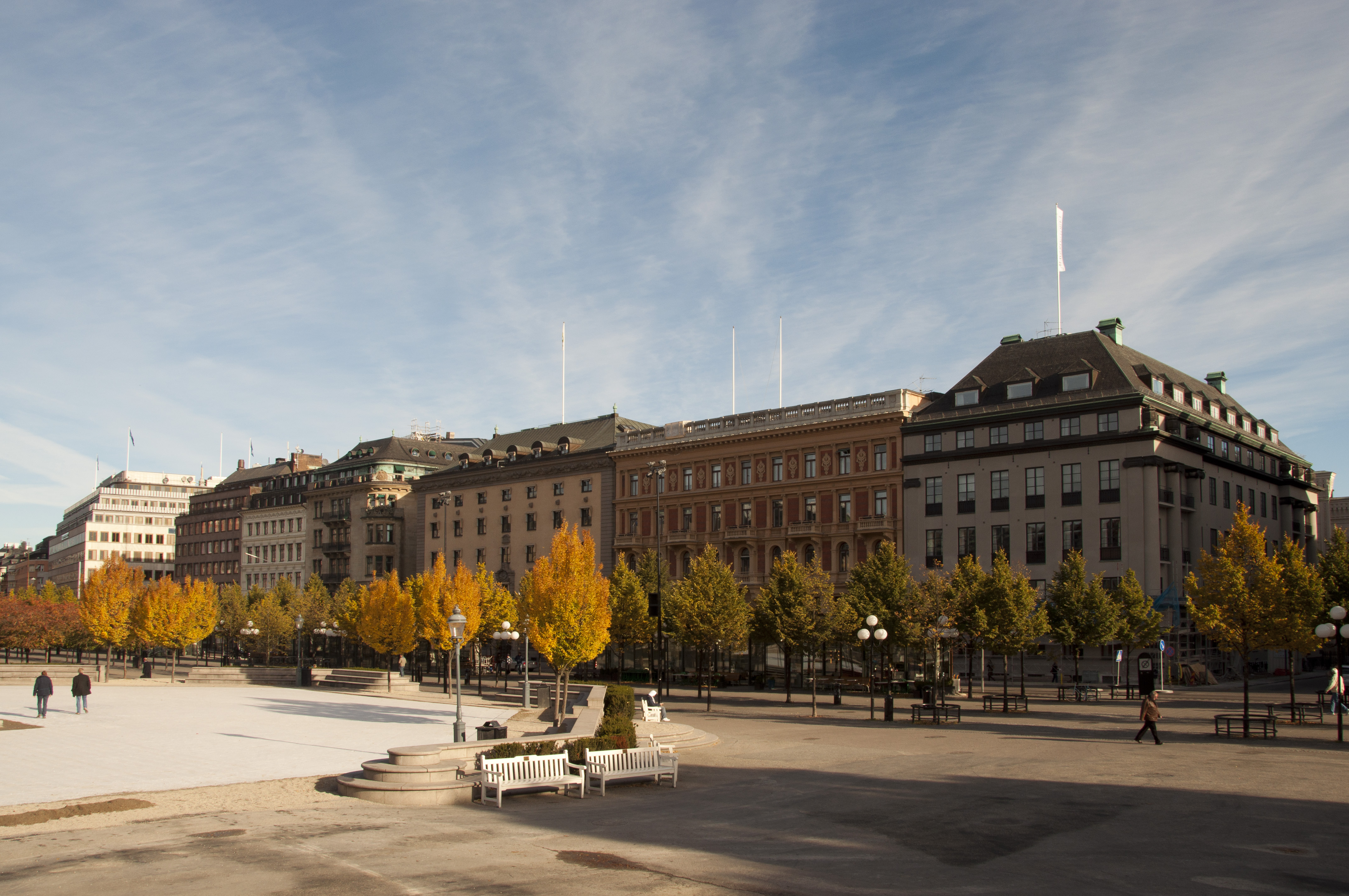 Kungsträdgårdsgatan